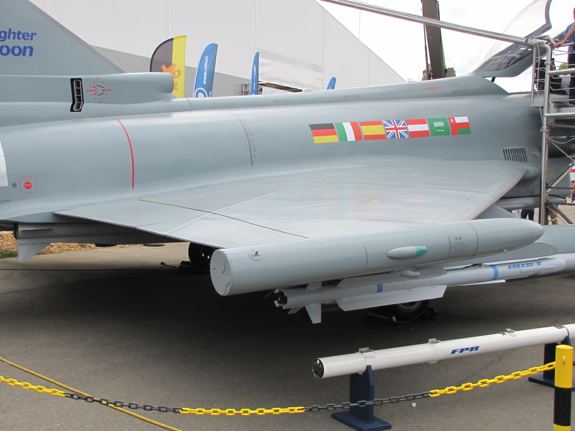 Eurofighter Typhoon a zeltwegi Airpower 2013 statikus során. Gyártó: Eurofighter GmbH.